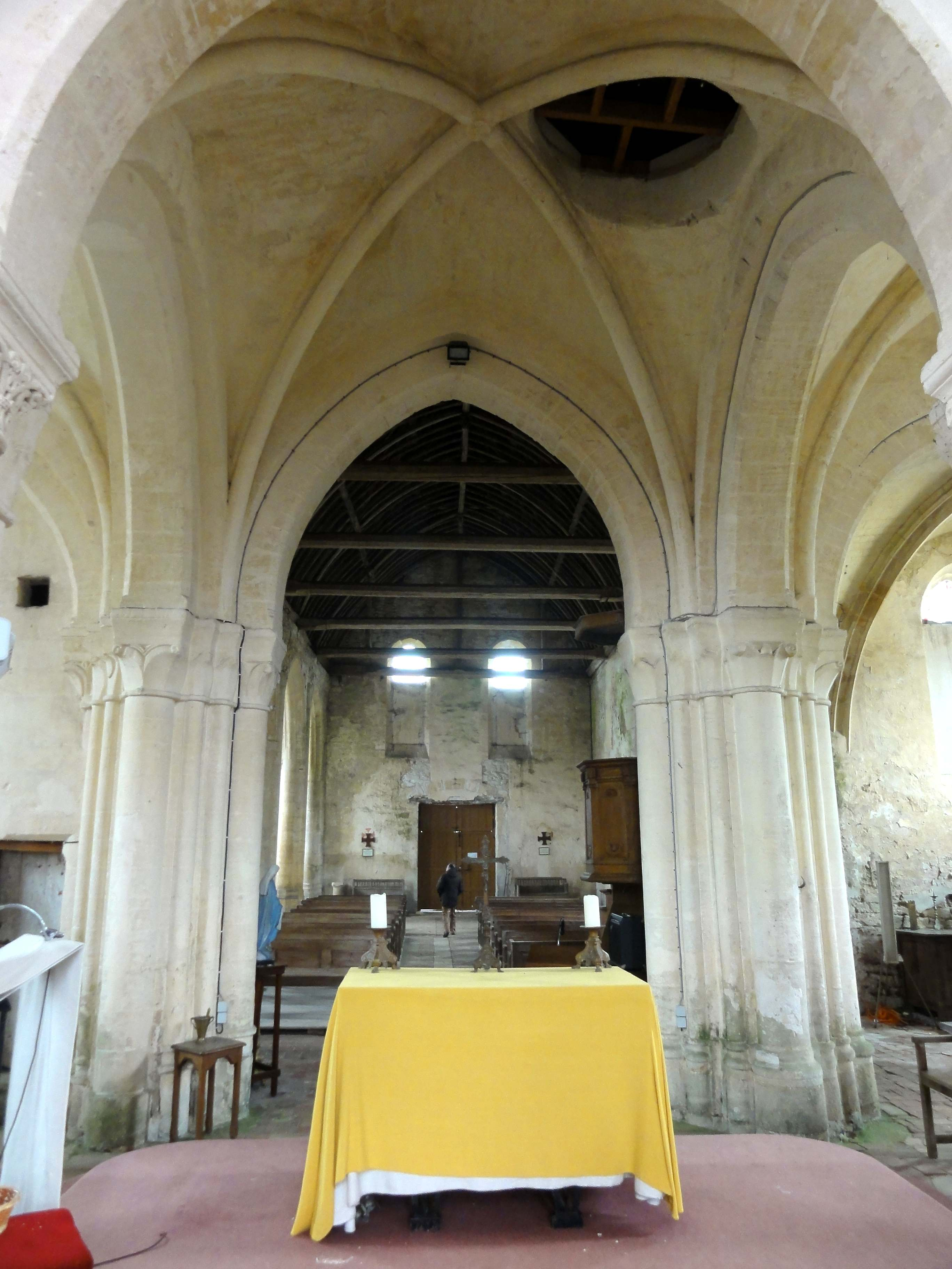 Intérieur de l'église (voir titre).